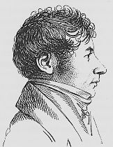 French geographer and archaeologist Edmé François Jomard (1777-1862) by André Dutertre (1753-1842).